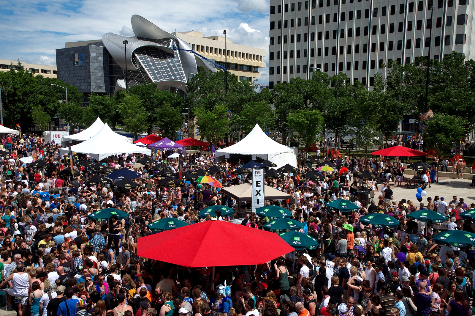 Edmonton Pride